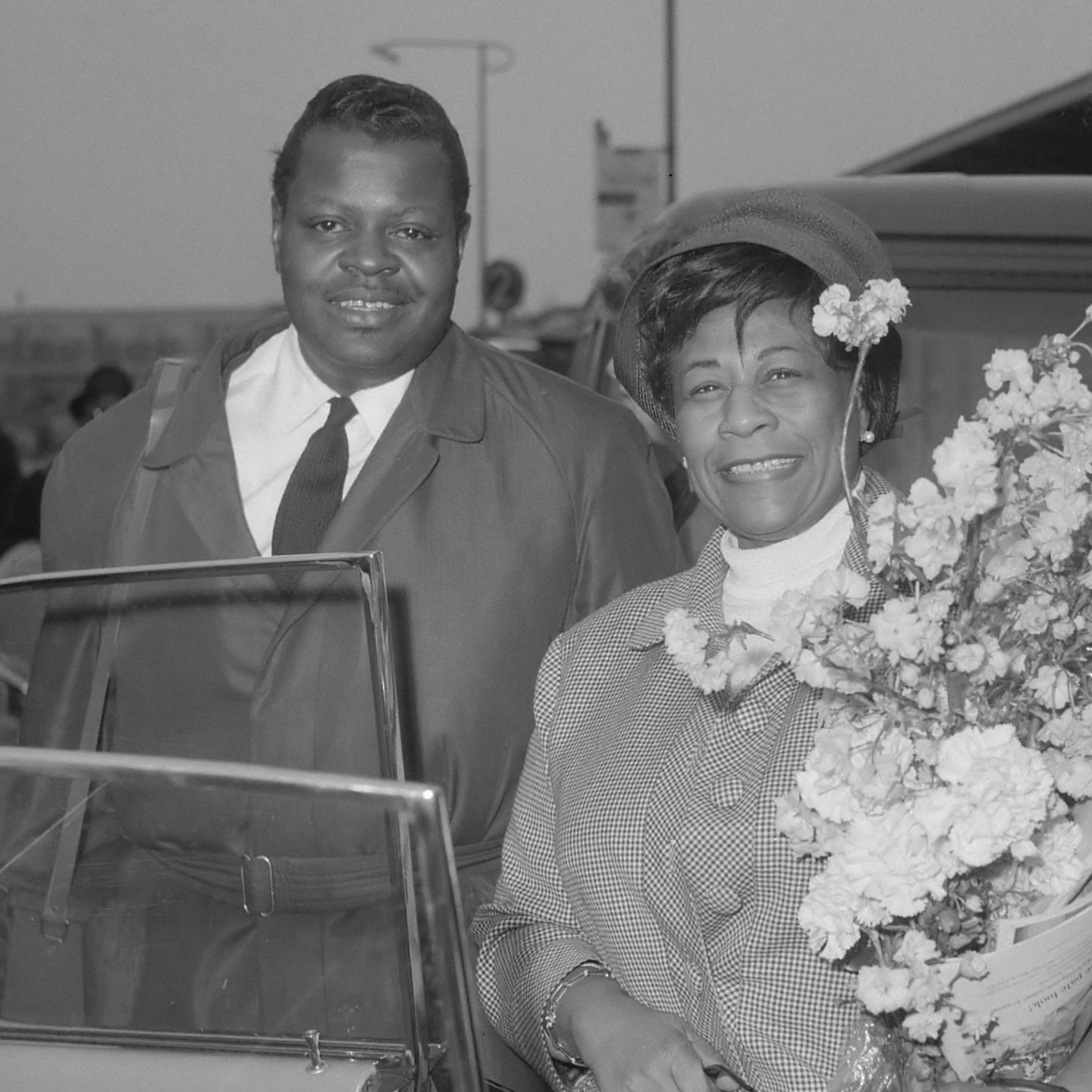 Aankomst Ella Fitzgerald en Oscar Peterson (links) op Schiphol 24 april 1964